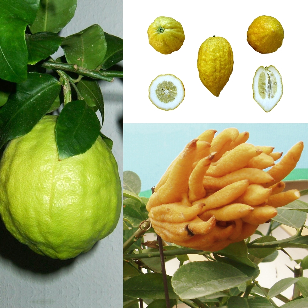 Grafika podręcznika Wikijunior:Owoce. Cytron (Citrus medica).